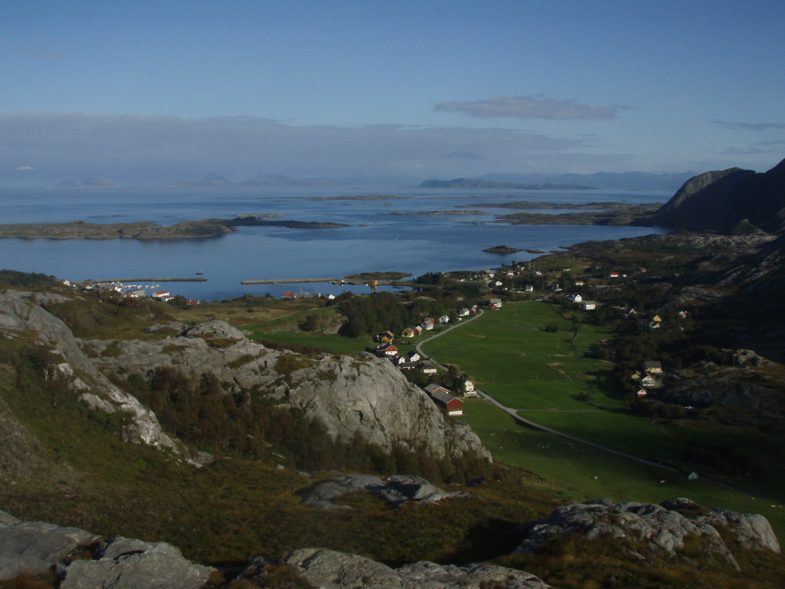 Atløy bygde sentrum